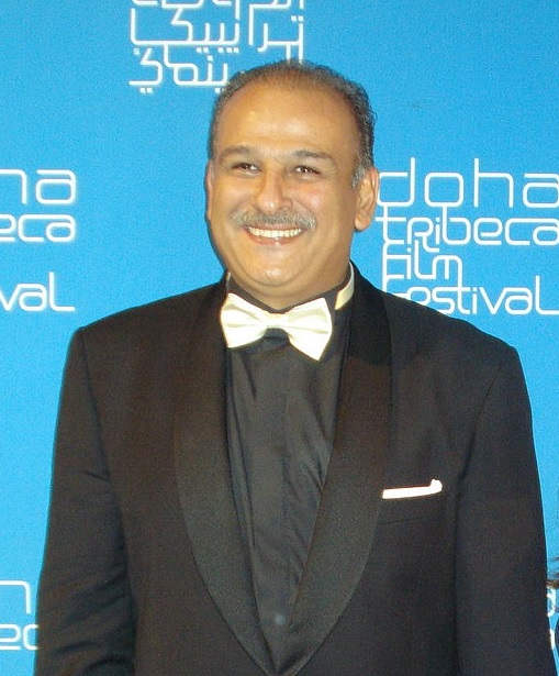 Jamal Suliman and his wife Rana Salman in Qatar 2009.